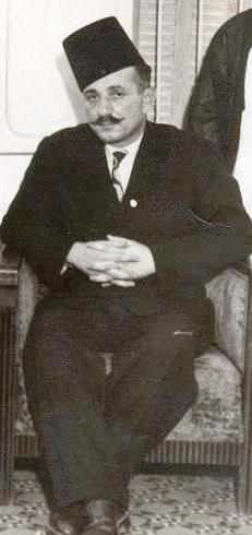 أحمد عبد اللطيف الأسعد - (1902 - 1961)، سياسي لبناني